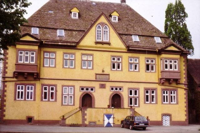 Dies ist das Schloß Amelunxens.